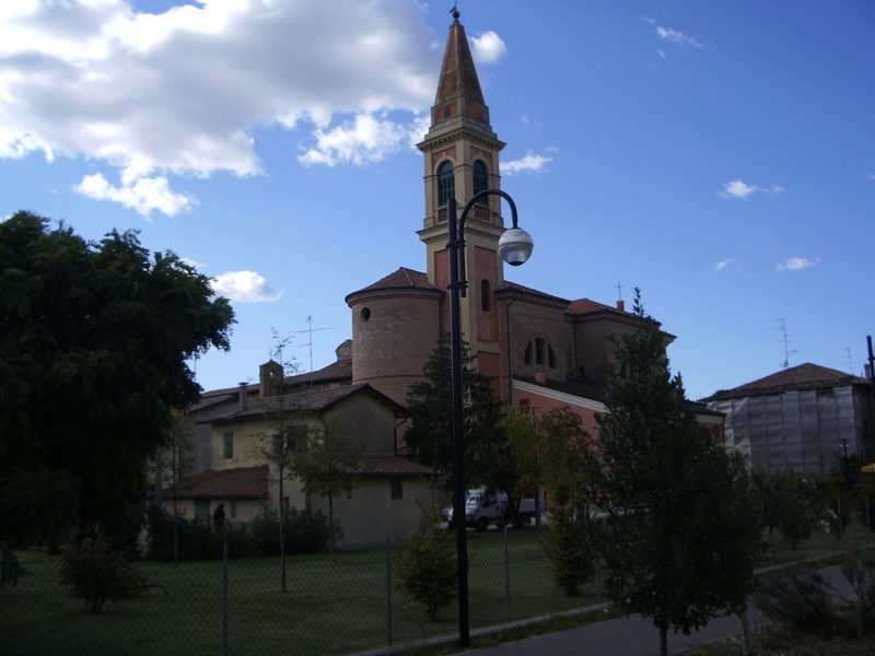 Chiesa di Baricella